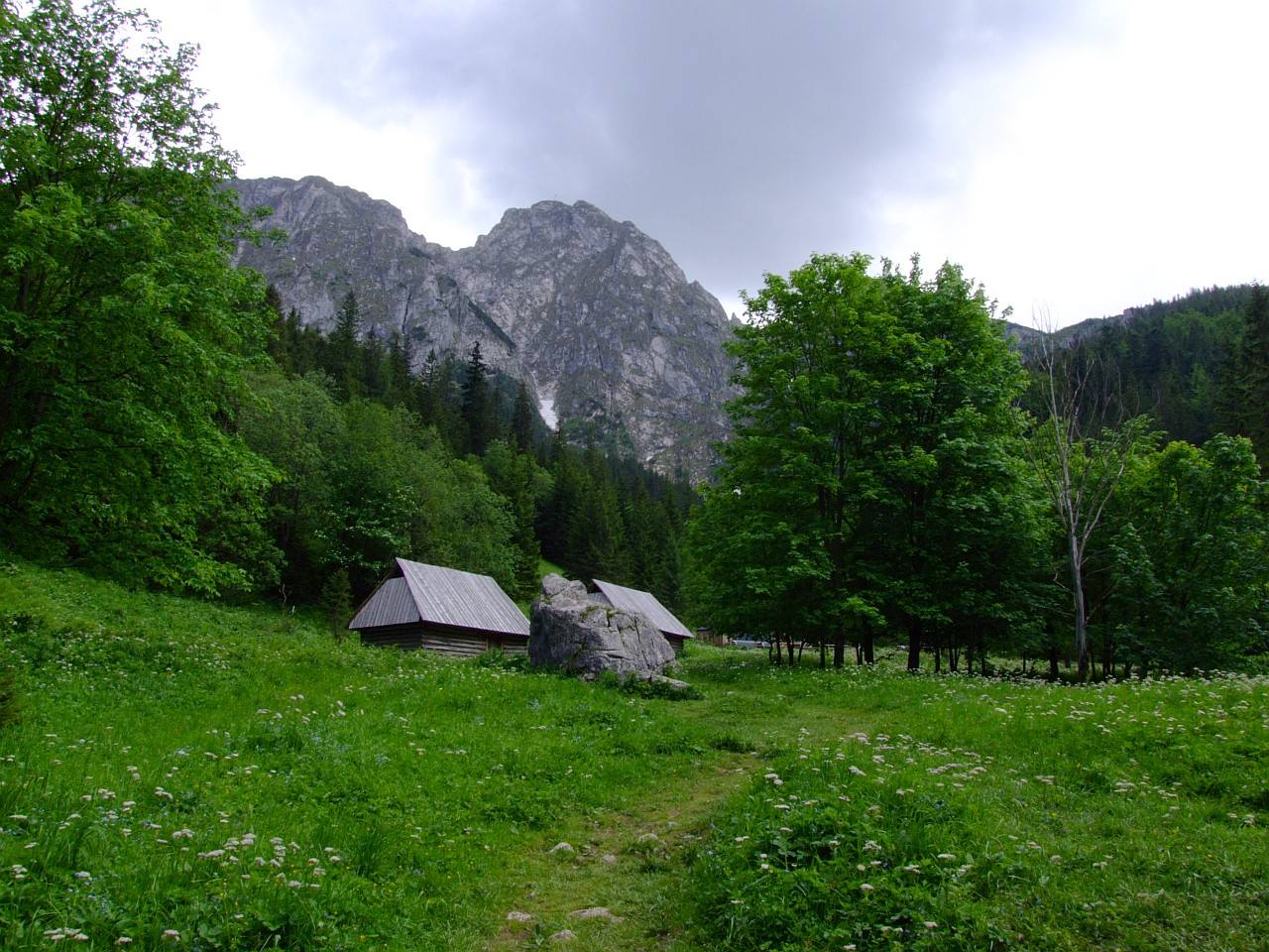 Górna część doliny Strążyskiej. U góry Giewont